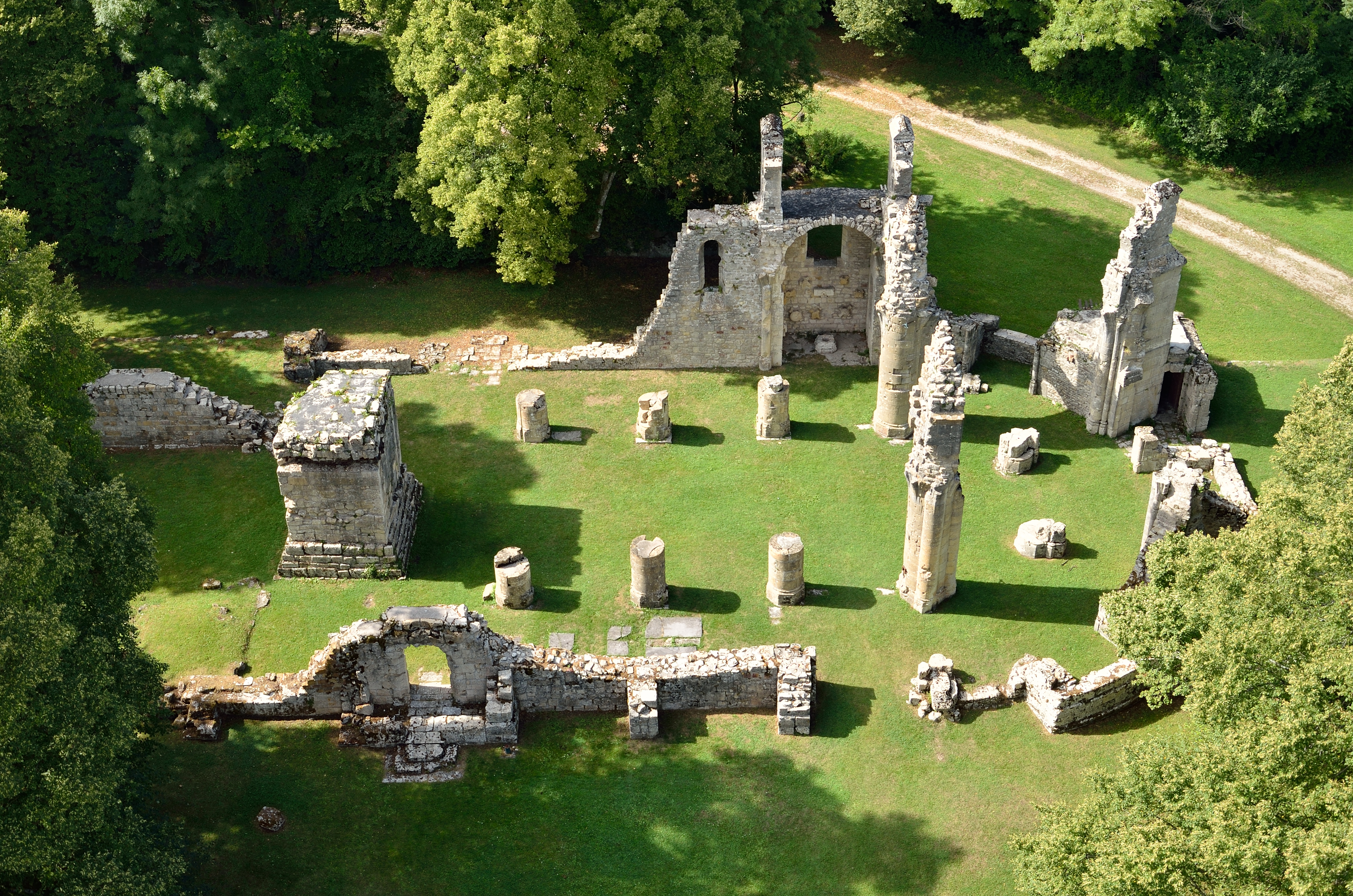 Vues depuis le sommet du monument américain, les ruines de la collégiale Saint-Germain, détruite pendant la Première Guerre Mondiale, sur les terrains de « zone rouge » à Montfaucon-d'Argonne (Meuse) .